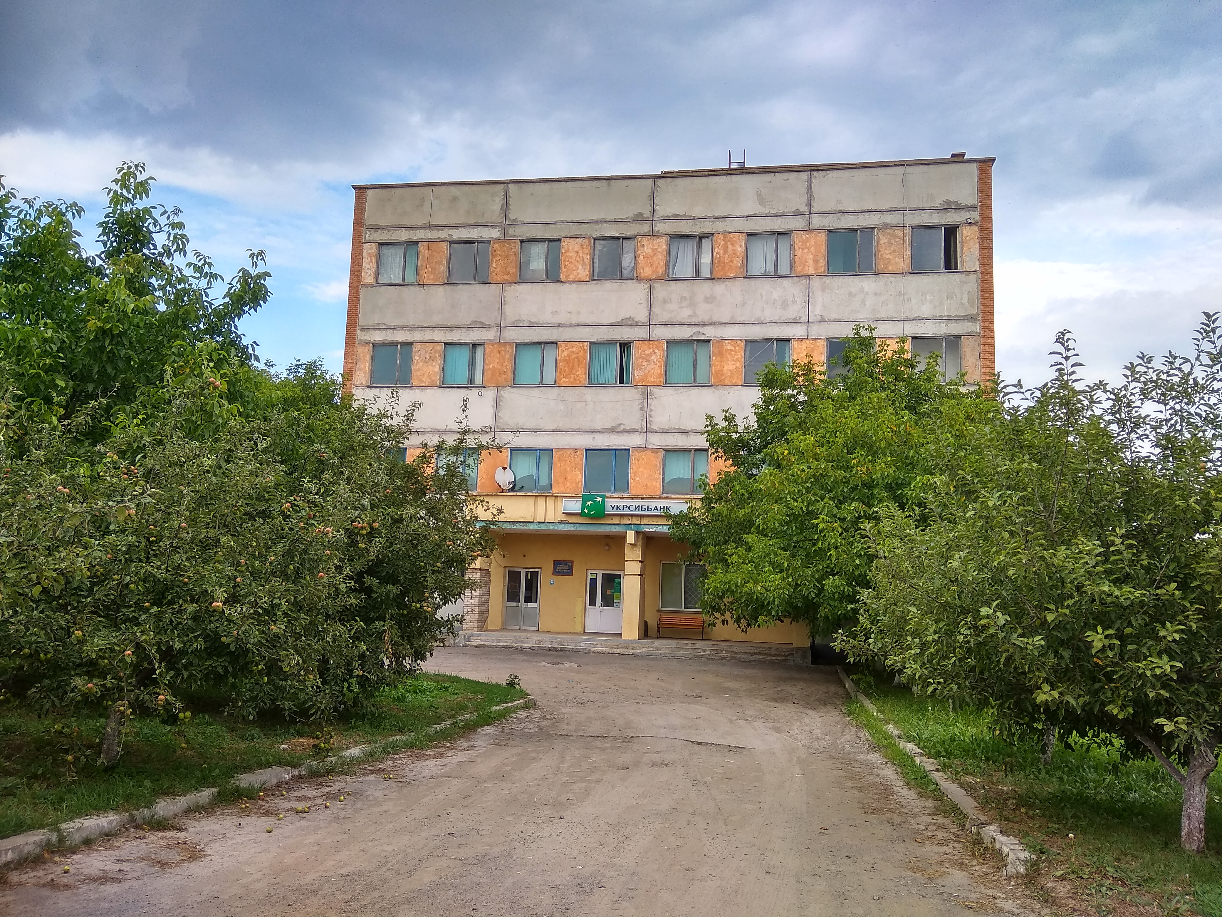 Барська швейна фабрика Вінничина